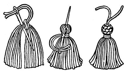 Tassel making